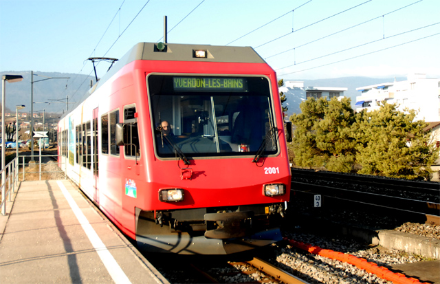 YSteC Be 2001 op 3 februari 2007 te William Barbey YSteC